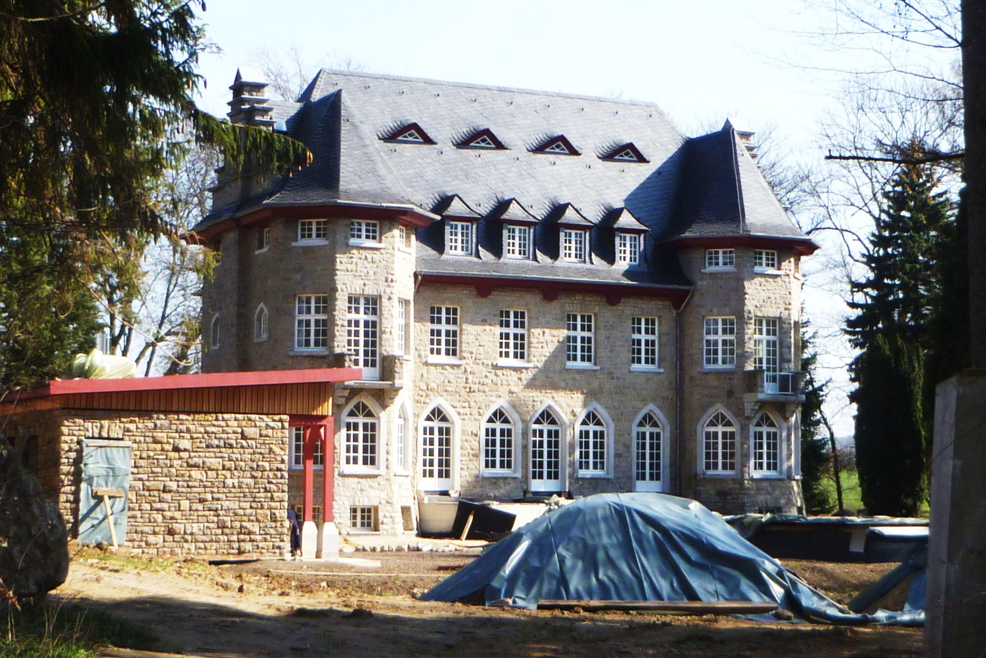 Baudenkmal in Aachen-Walheim